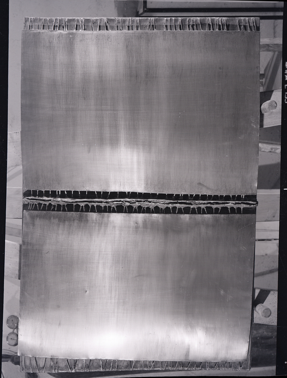 Servizio fotografico : Milano, 1965 / Paolo Monti. - Buste: 23, Fototipi: 24 : Negativo b/n, gelatina bromuro d'argento/ pellicola ; 6x6, 6x9. - ((Serie costituita da 23 buste di negativi identificati con una doppia numerazione: 20084 (512), 20085 (512), 20086 (513), 20087 (513), 20088 (514), 20089 (6x6) (532) 20089 (6x9) (515), 20090 (533), 20091 (534), 20092 (535), 20093 (536), 20094 (537), 20095 (565), 20096 (566), 20097 (567), 20098 (568), 20099 (569), 20100 (570), 20101 (571), 20102 (572), 20103 (573), 20104 (574), 20105 (575), 20106 (584), e tenute insieme da una graffetta. . - La seconda numerazione è manoscritta a matita in alto al centro della busta. - Occasione: Documentazione per pubblicazione. - Fonte: Monografia di Ballo, Guido: Dalla poetica del segno alla presenza continua: Arnaldo e Giò Pomodoro, Milano, Luigi Maestri Editore (1962). - Fonte: Monografia: Arnaldo Pomodoro, catalogo della mostra, Roma 1965, Roma, Tip. Christen (1965). Catalogo della mostra: febbraio-marzo 1965, Marlborough Galleria d'arte, Roma, Marlborough Fine art, Londra, Marlborough Gerson gallery, New York